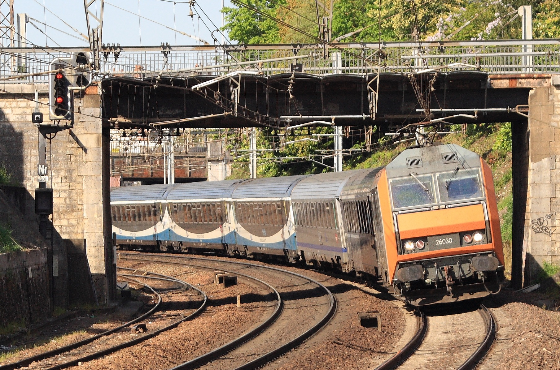 Interloire dans la courbe à la sortie de la gare de Blois, avril 2009